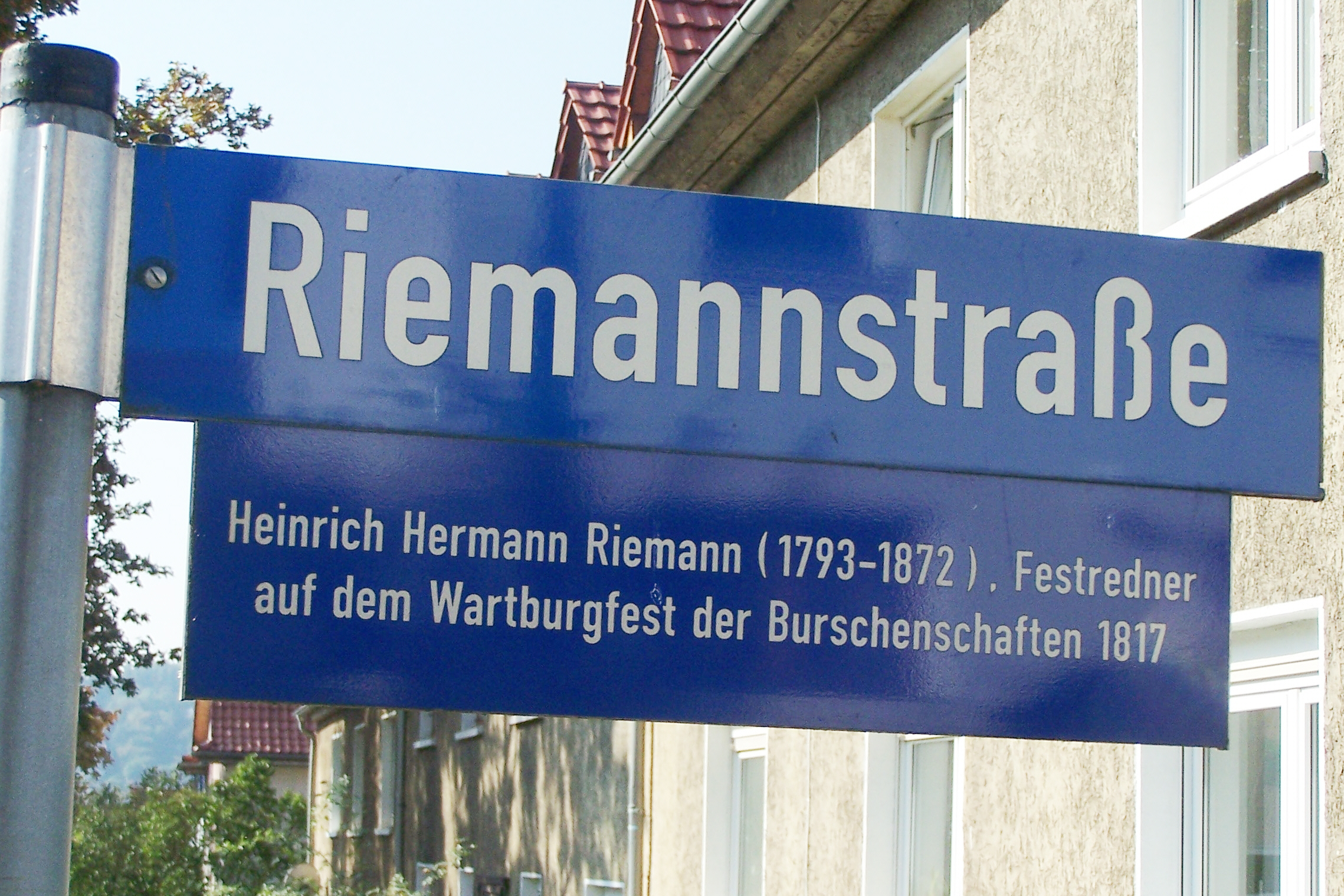 Straßenschild und Erläuterung zur Riemannstraße in Eisenach.